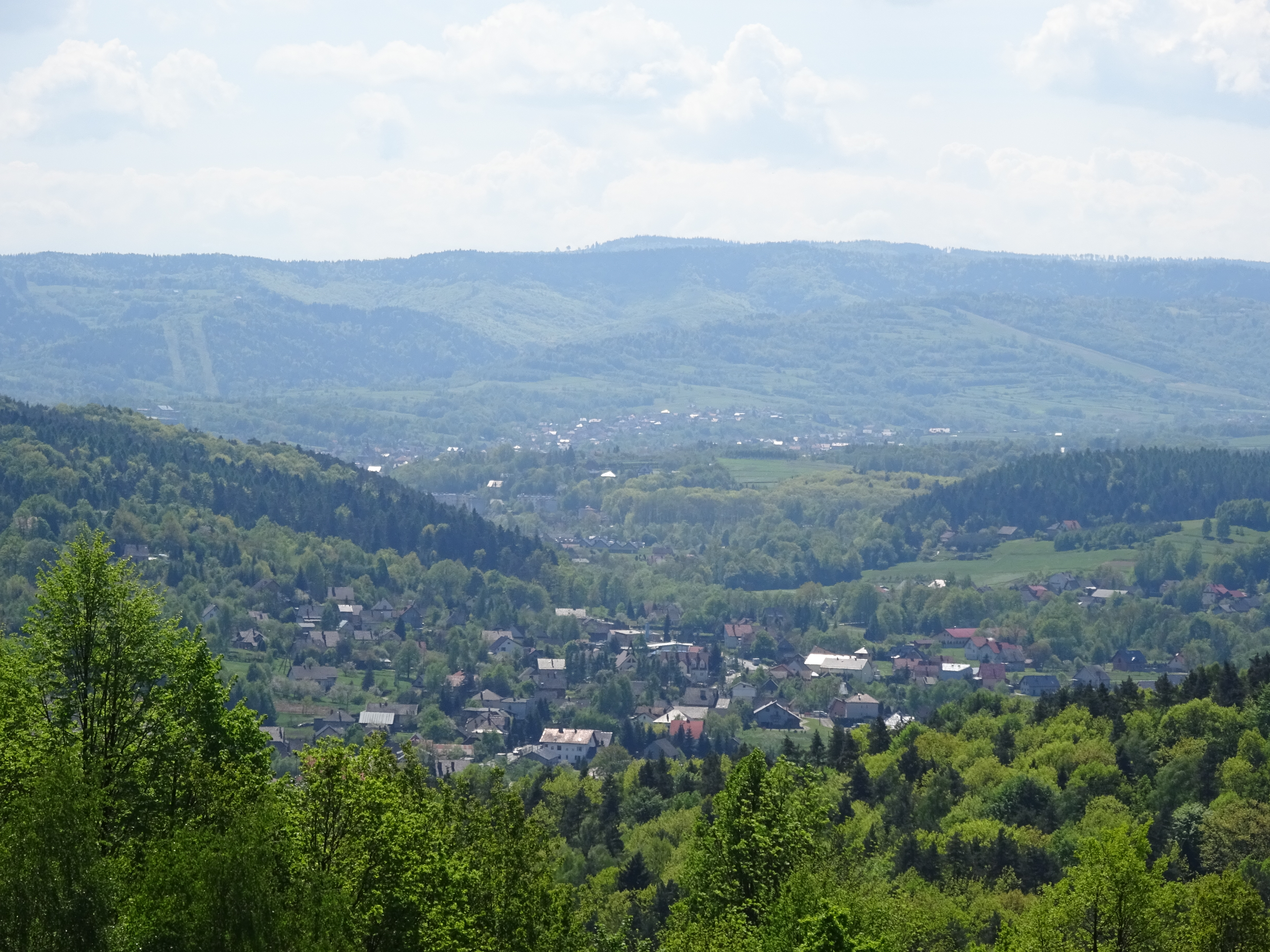 Sułkowice. Widok na miejscowość od północy. 2016